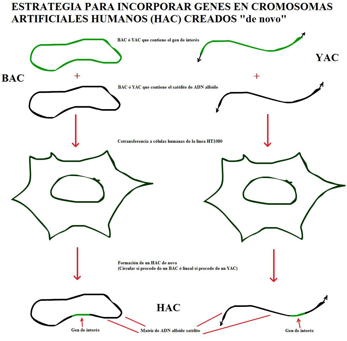 Estrategia para incorporar genes en cromosomas artificiales humanos.